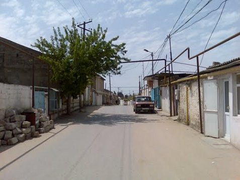 Один из дворов села